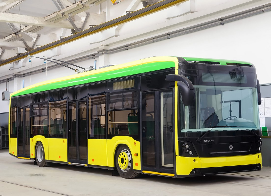 Тролейбус міський Т19 "Електрон"